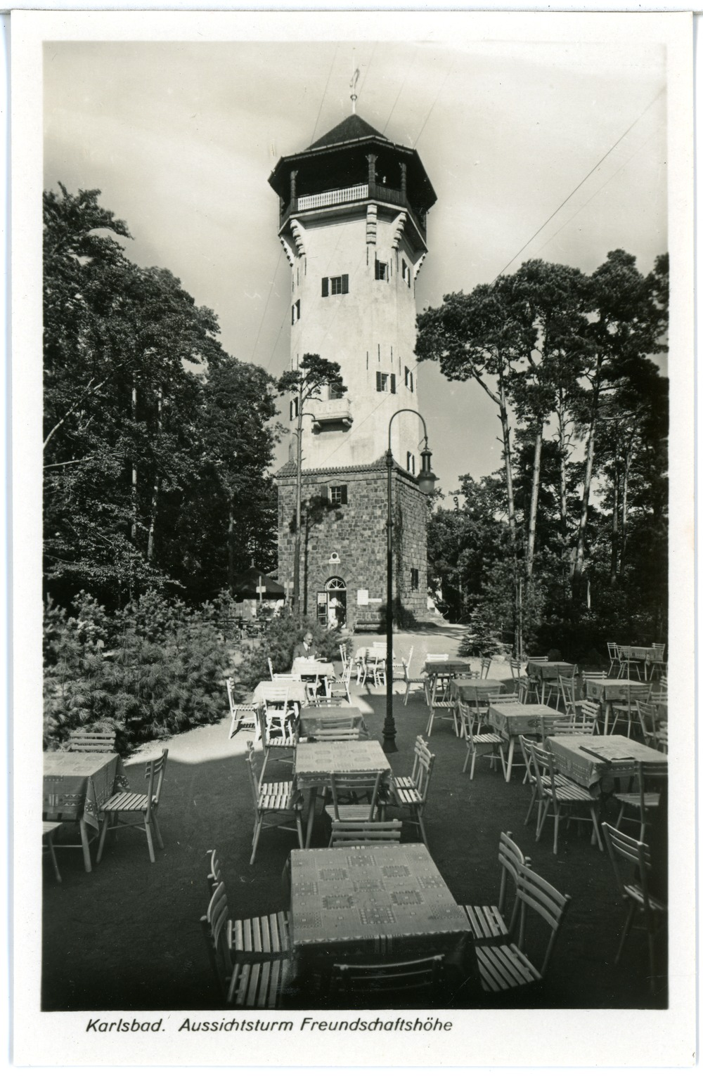 Karlsbad; Aussichtsturm Freundschaftshöhe This postcard is from publisher Brück & Sohn in Meißen ( postcard has a unique number 25570 and is available in a higher resolution at the publisher. This images was uploaded in a cooperation project between Wikipedians and the publisher.